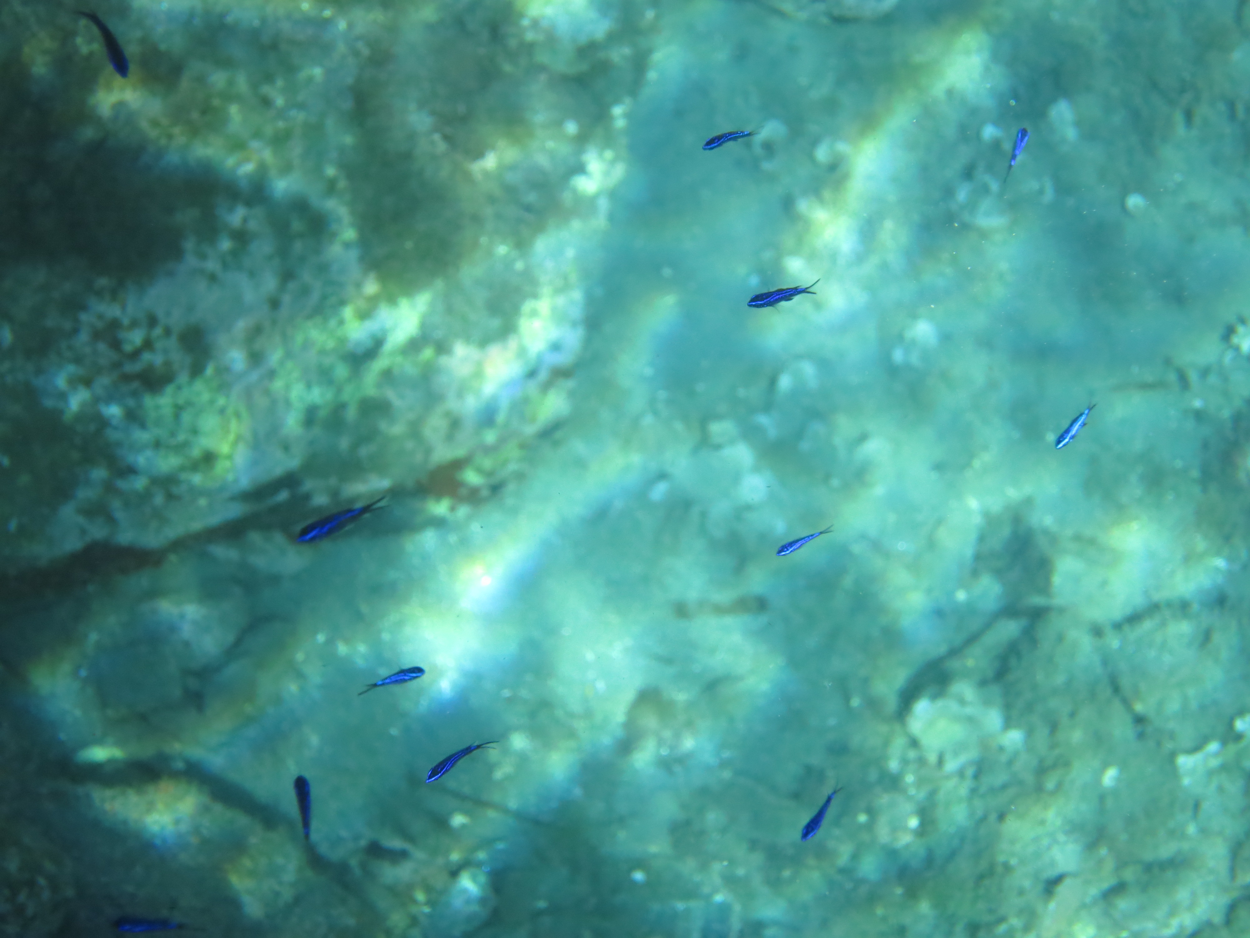 Fauna y flora marina de la costa del Parque natural de cabo de Gata-Níjar. La profundidad es inferior a 3 metros. El día era soleado y caluroso (unos 30ºC). Foto realizada durante una sesión de snorkel. Chromis chromis